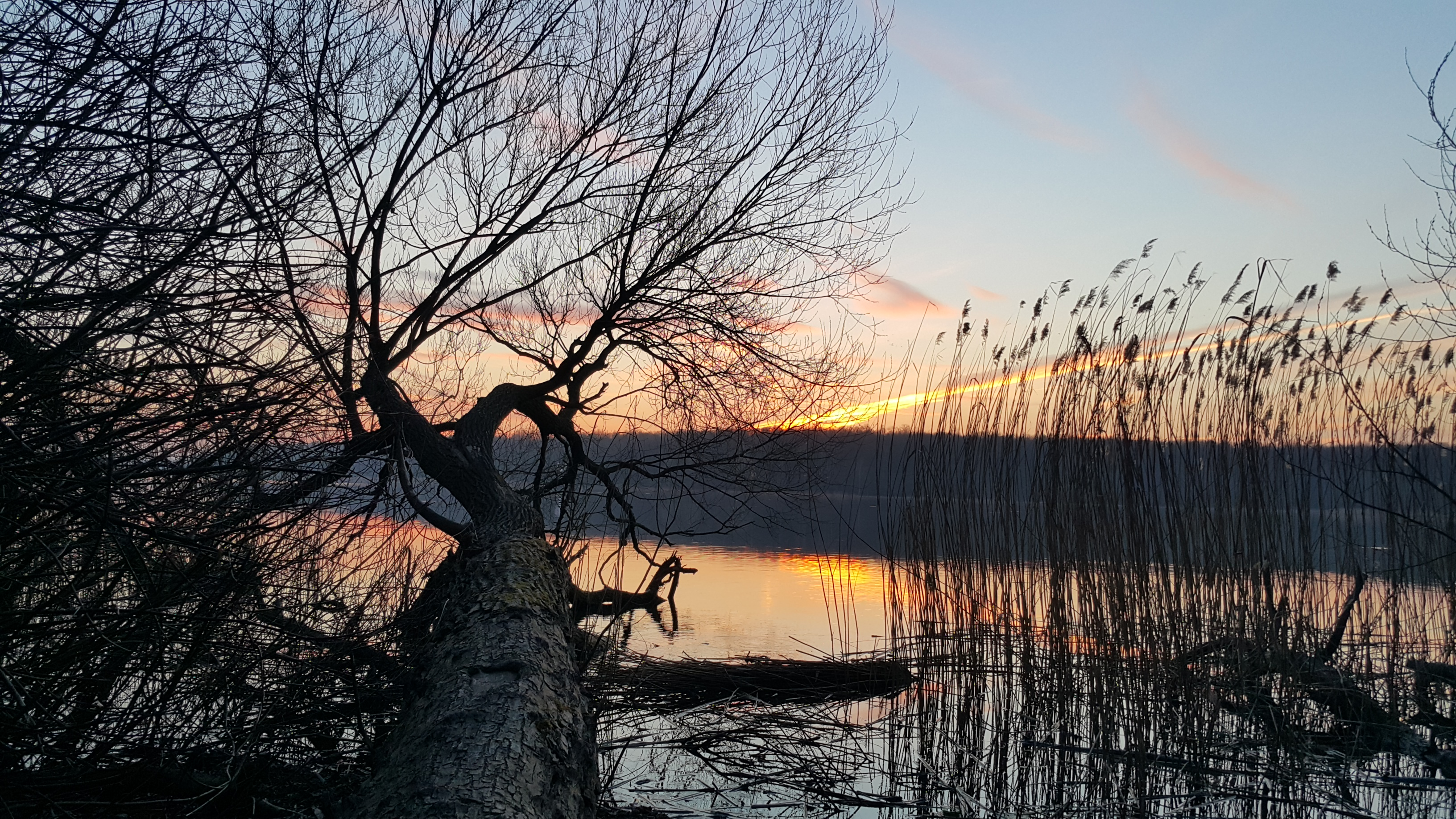 Jezioro Swarzędzkie. Zachód słońca